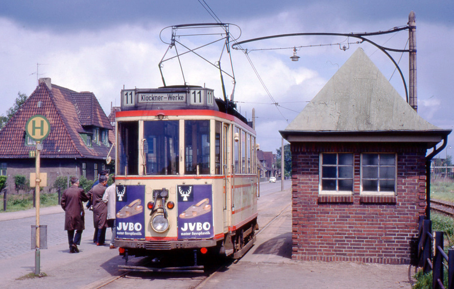 Straßenbahn Bremen, Wagen Nr. 117 am Sonntag, den 18. Mai 1963 an der Endstelle Klöckner-Werke